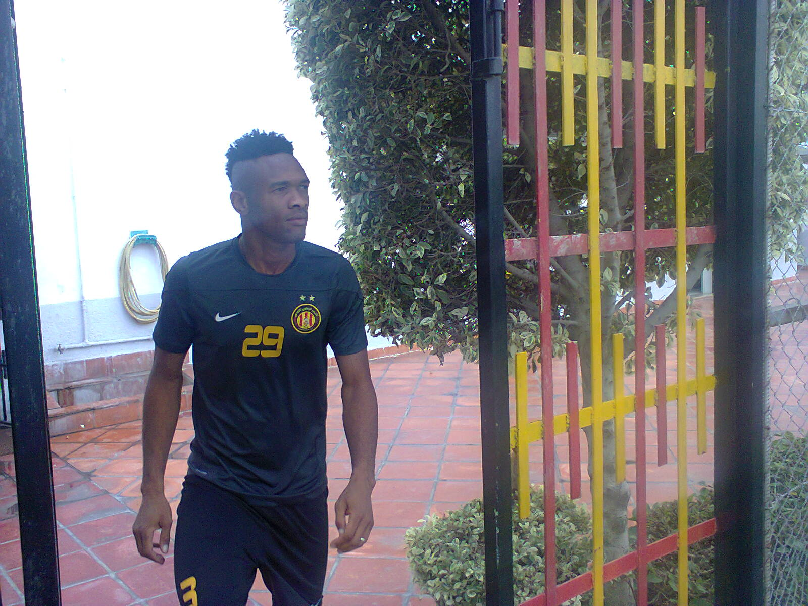 Fousseny Coulibaly à l'Entraînement